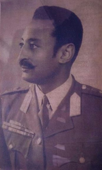 Brigadier-General Mengistu Neway (1919 – 30 March 1961).